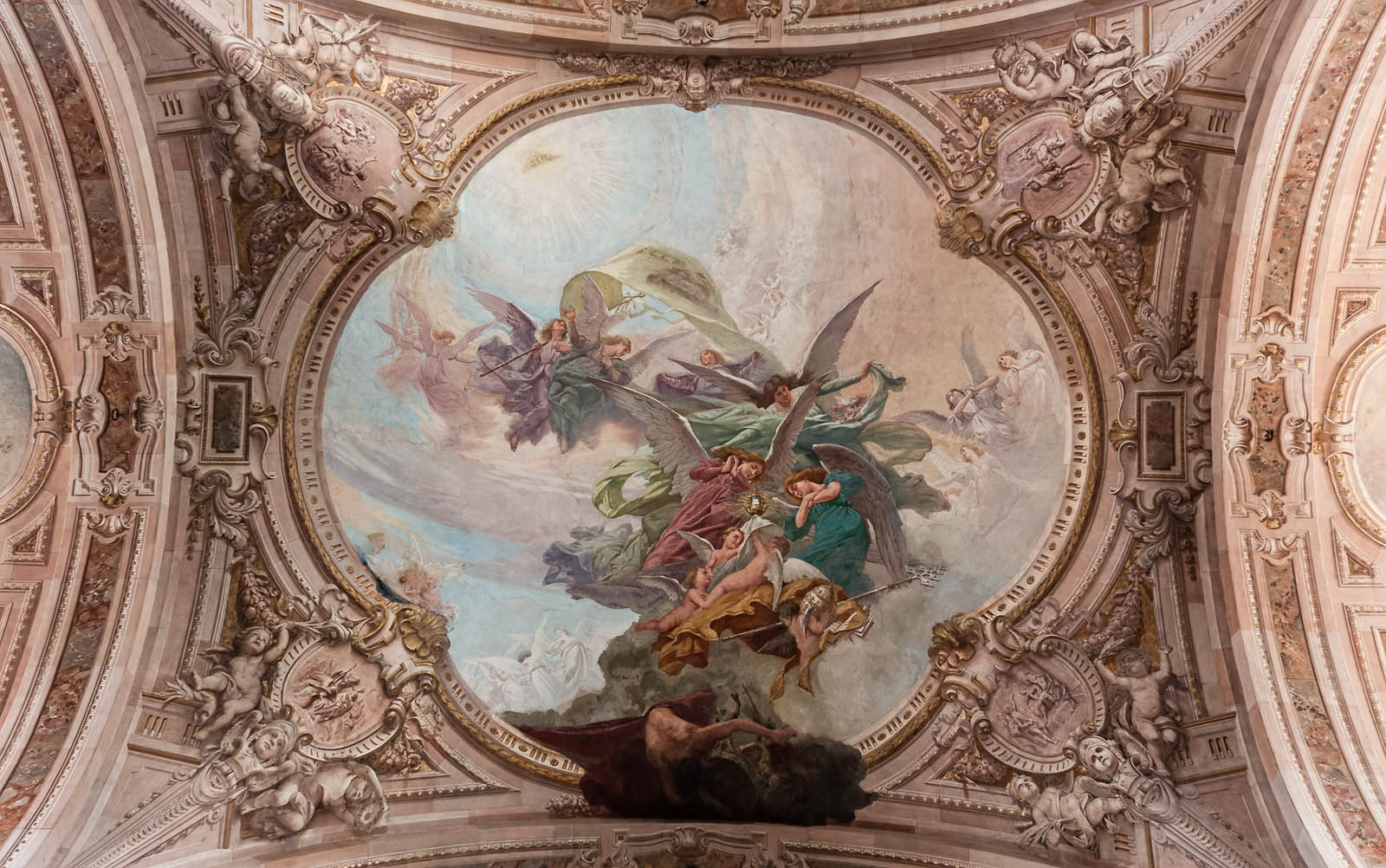 Basilica di San Giovanni Battista This is a photo of a monument which is part of cultural heritage of Italy.